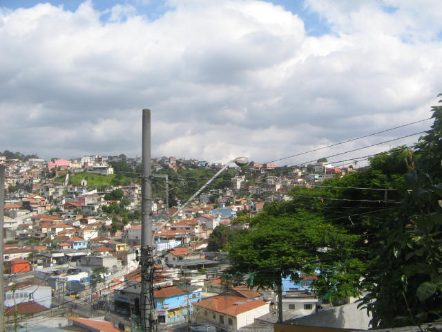 Bairro de Perus (São Paulo)